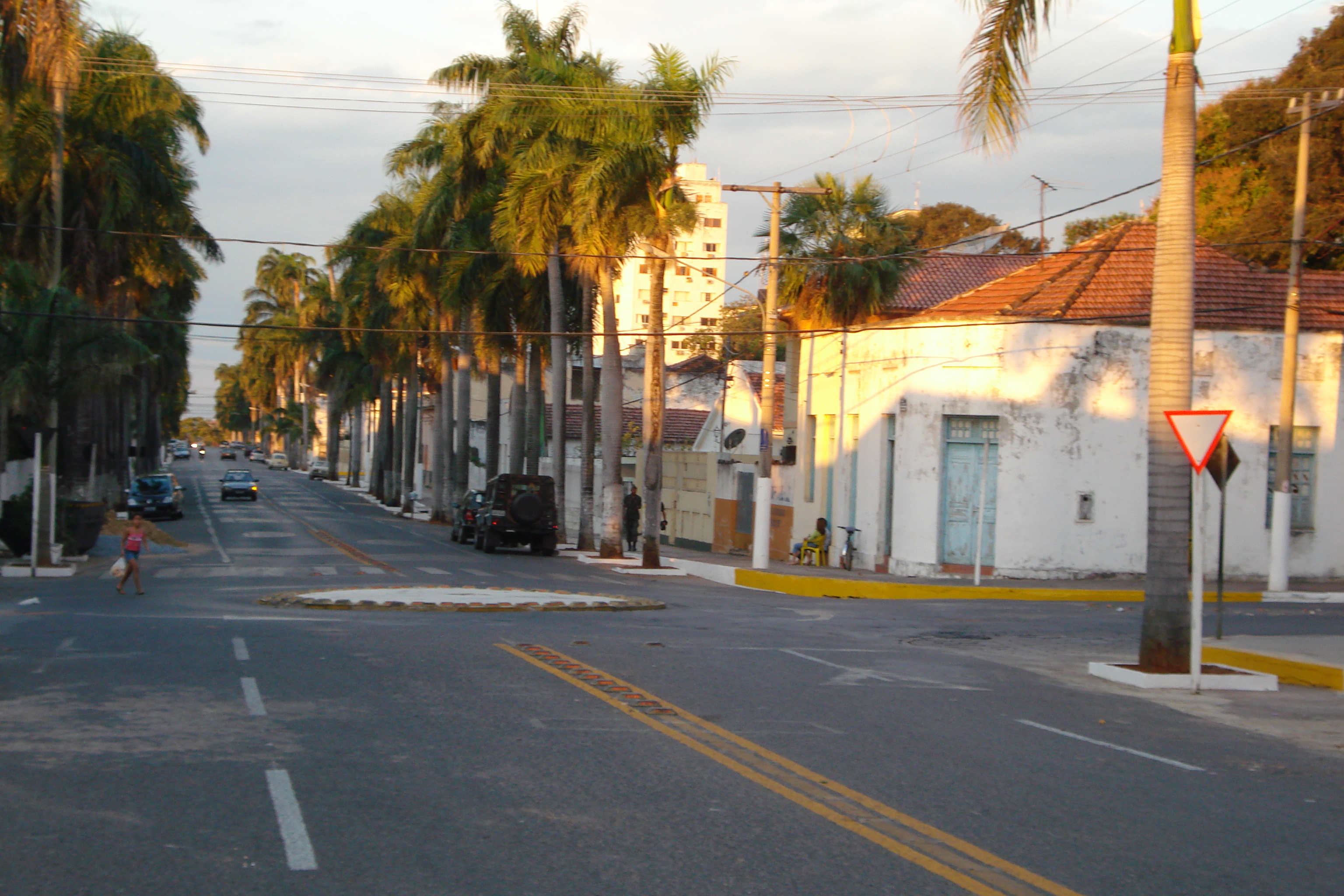 General Rondon Avenue